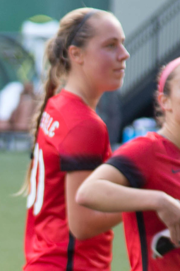 N42A3254.jpg